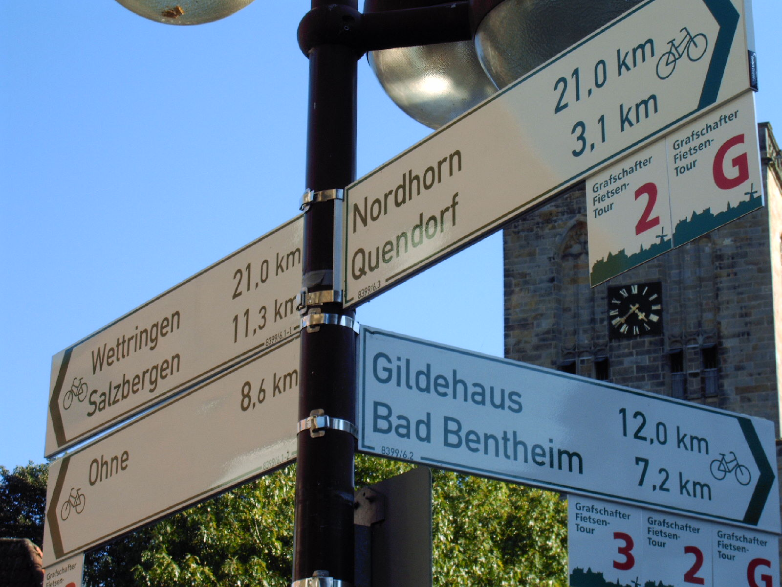 Das Foto zeigt ein Wegweiser-Schild in Schüttorf am Marktplatz.